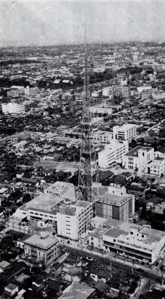 日本テレビの本社屋、1961年ごろ（現在の麹町分室）